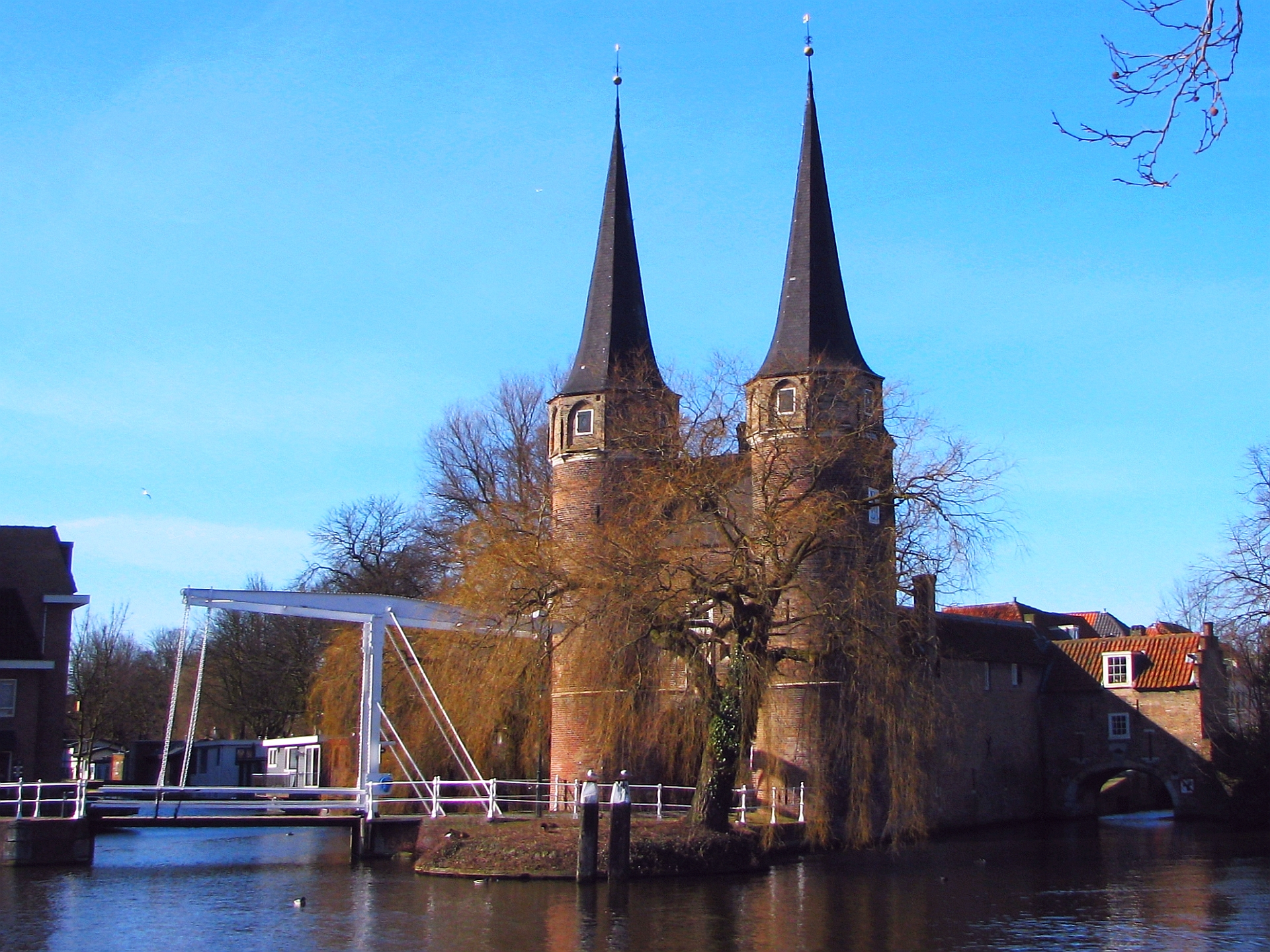 Delfter Stadttor "Oostport" am Rijn-Schiekanaal mit Zuidergrachtbrug, Zuidholland Niederlande Foto Wolfgang Pehlemann IMG_2340